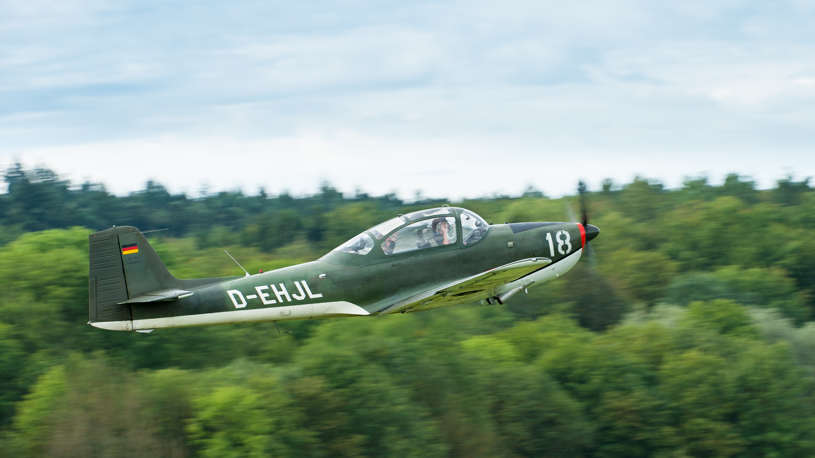 Dieses Foto wurde beim Oldtimer Fliegertreffen, 2013 am Flugfeld Hahnweide bei Kirchheim unter Teck aufgenommen. Es zeigt eine Piaggio P-149D beim Start